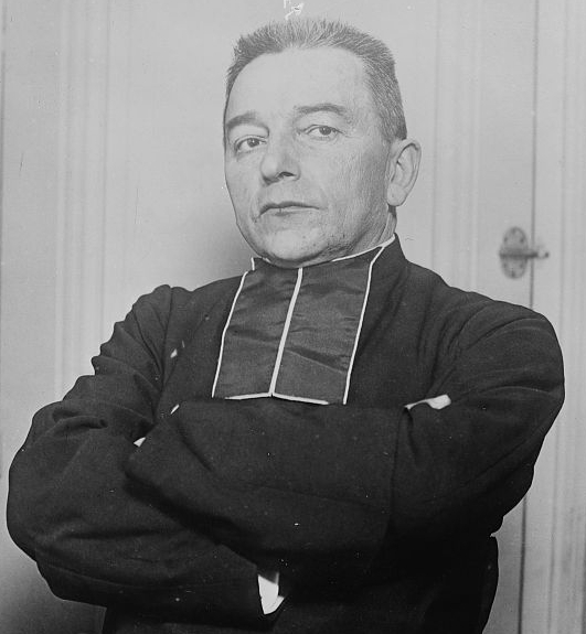 French priest and politician Émile Wetterlé (1861-1931)